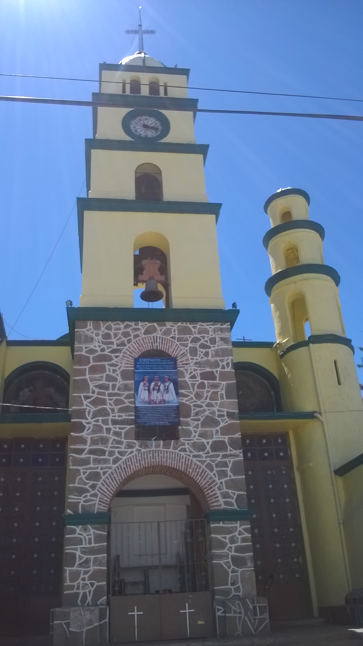 Iglesia de San José, Nanacamilpa, Tlaxcala